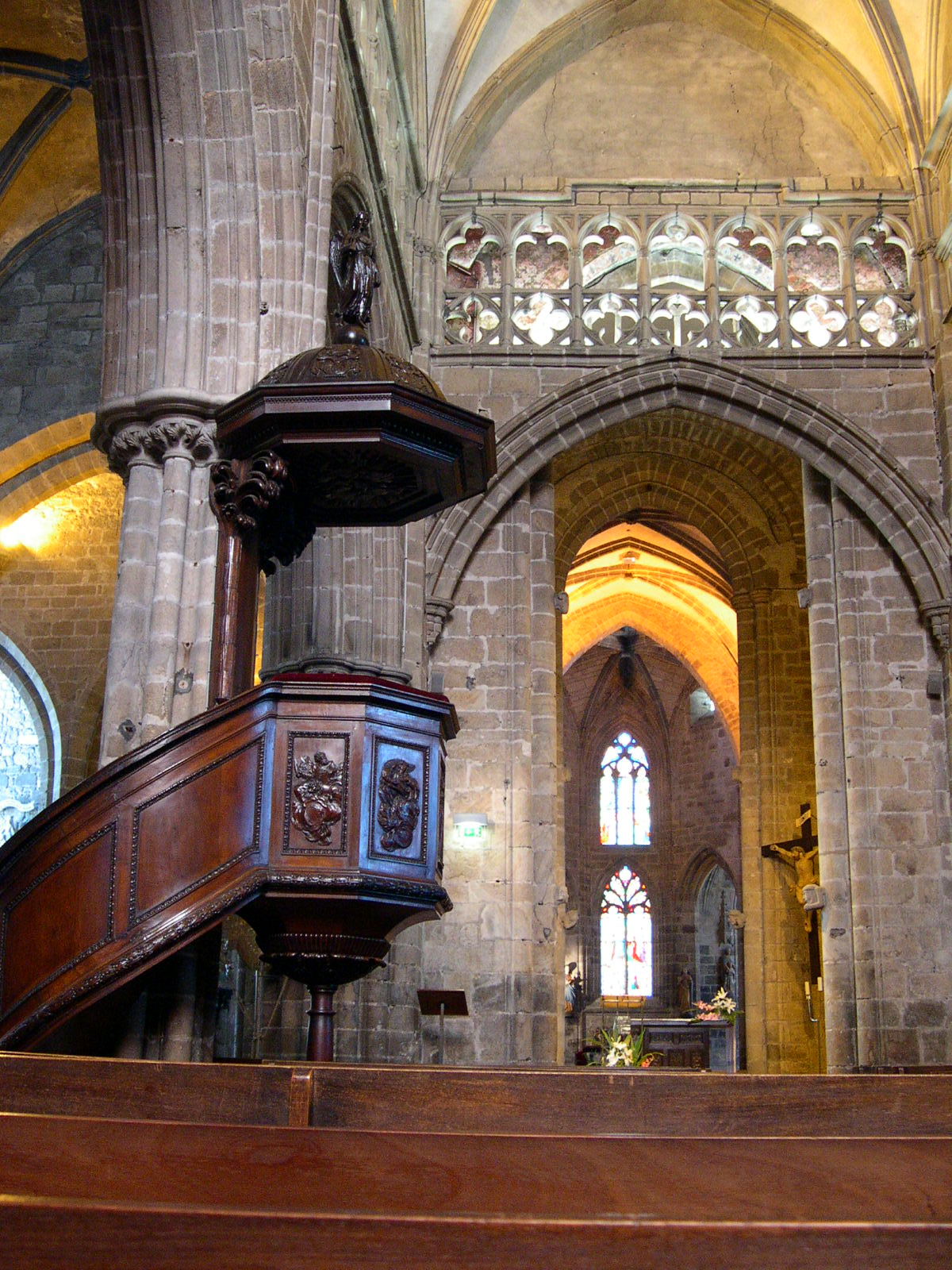 Basilique Notre-Dame de Bon-Secours de Guingamp - Guingamp - Côtes-d'Armor - France - Mérimée PA00089179 .